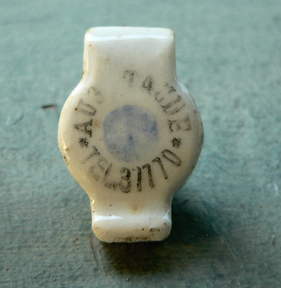 Bügelverschluss Aug Staude Tel 37770, gefunden in Hannover, rekonstruiert August Staude